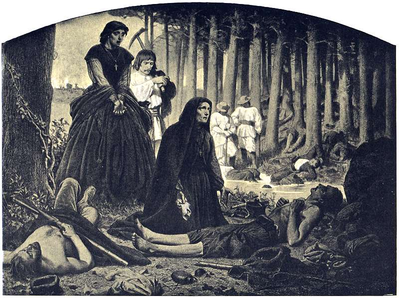 Cykl "Polonia", IX. Na pobojowisku by Artur Grottger